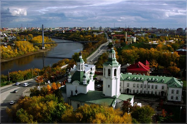 La Krestovozdviĵenskaja preĝejo (eo: Preĝejo honore al starigo de la Sankta Kruco), la Ponto de geamantoj kaj la Nikolskij-ponto. (Tjumeno, Rusio)